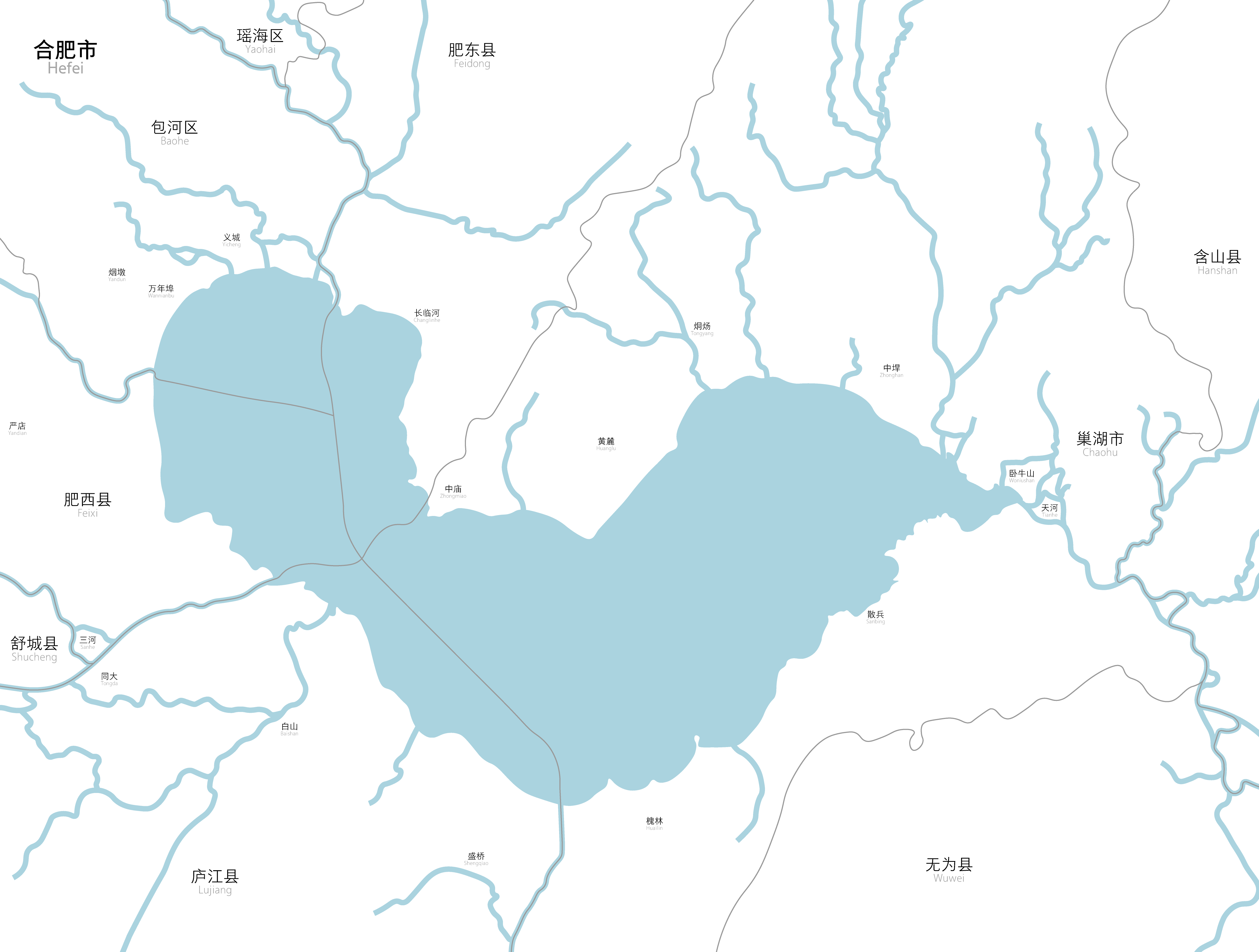 中文（中国大陆）: 巢湖水系示意图